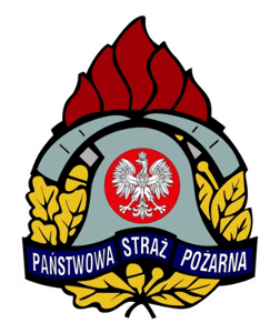 Logo Państwowej Straży Pożarnej